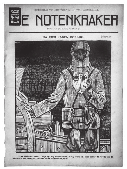 Hahns laatste voorplaat voor De Notenkraker, 12e jaargang nr. 31, 3 augustus 1918.